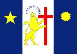 Bandeira da Cidade do Recife, Brasil